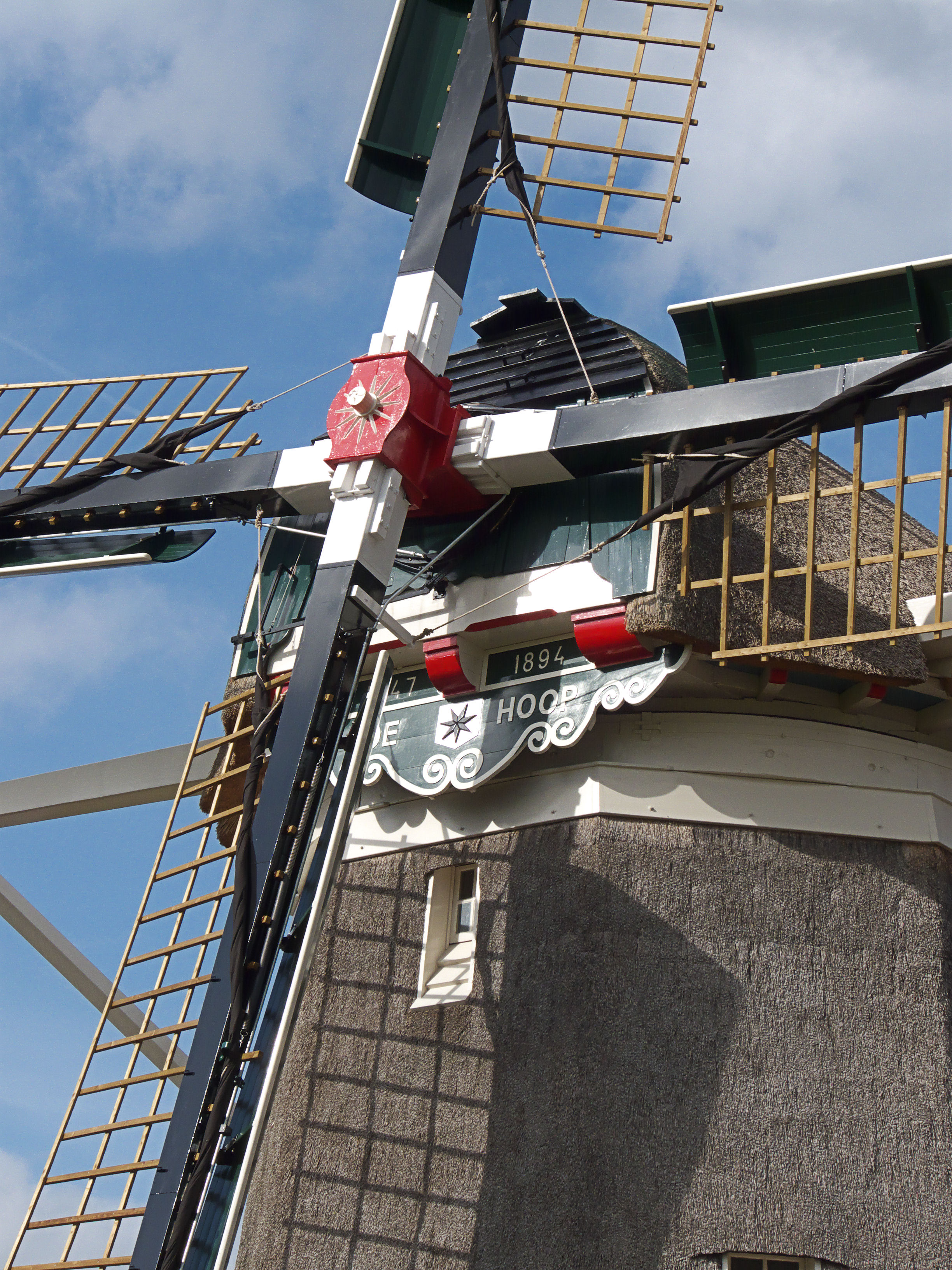 Molen De Hoop, Elspeet, baard en askop